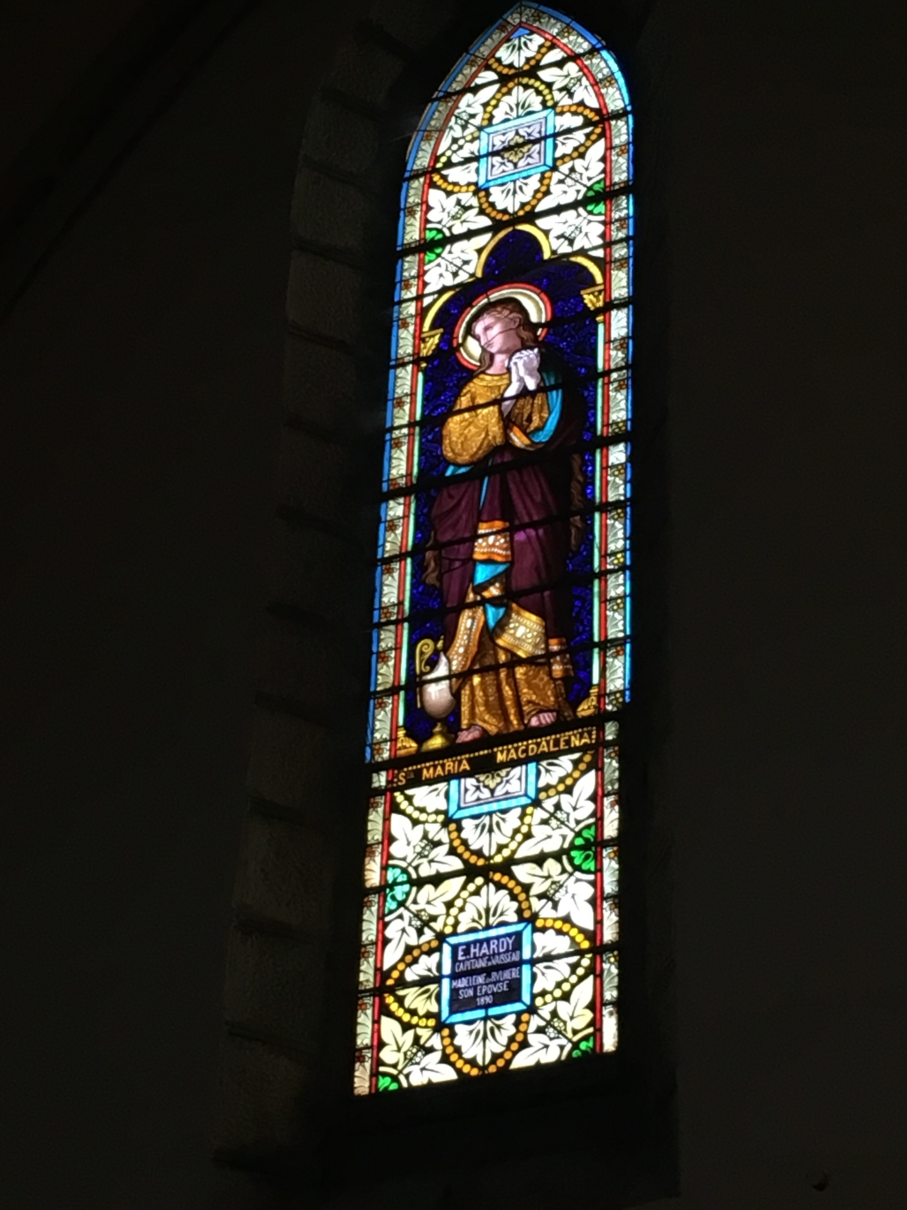 Vitrail de sainte Marie-Madeleine, représentée sous les traits de Marie de Béthanie (représentée avec le flacon de parfum) avec qui elle a longtemps été confondue.